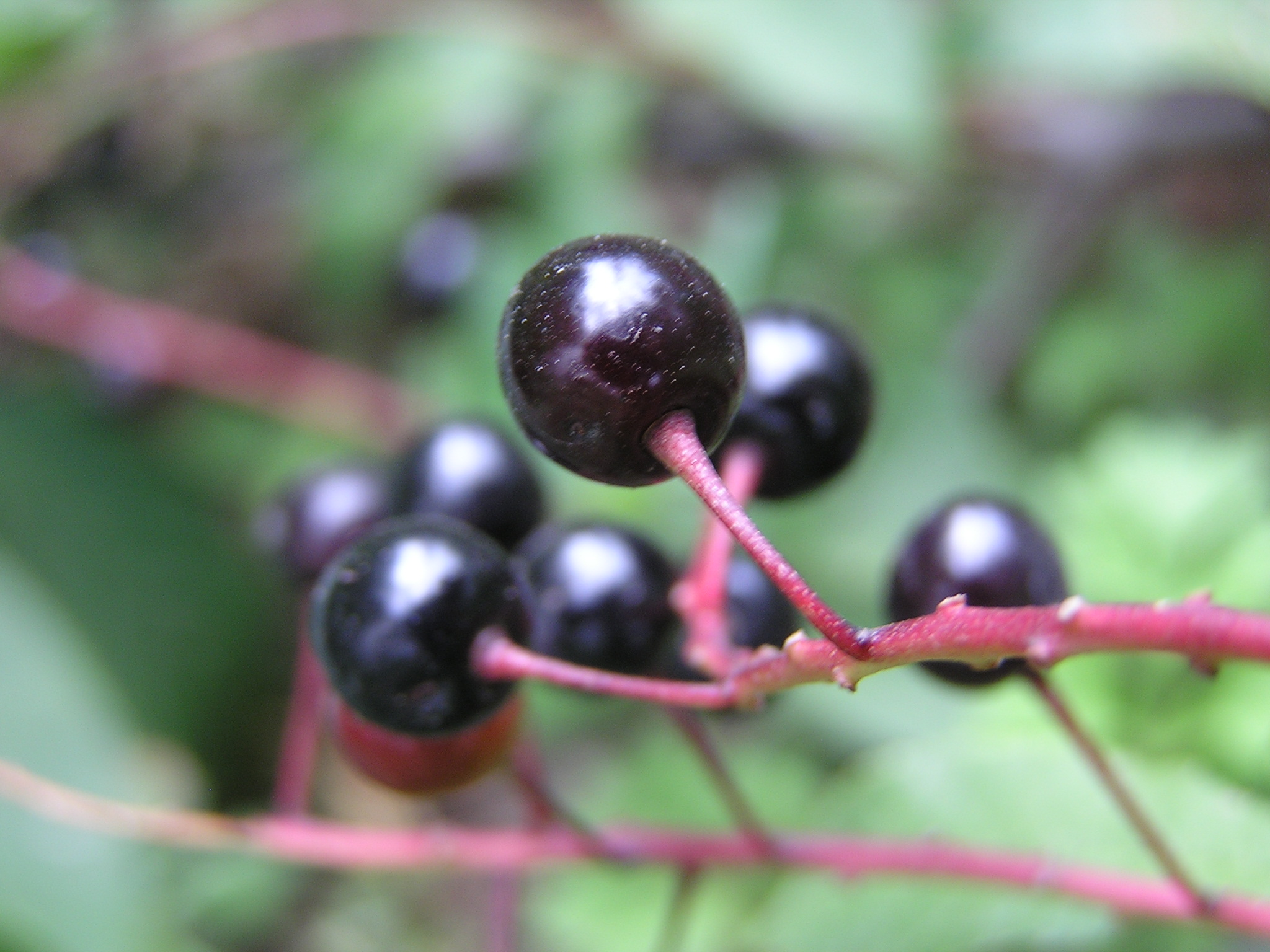 Растение